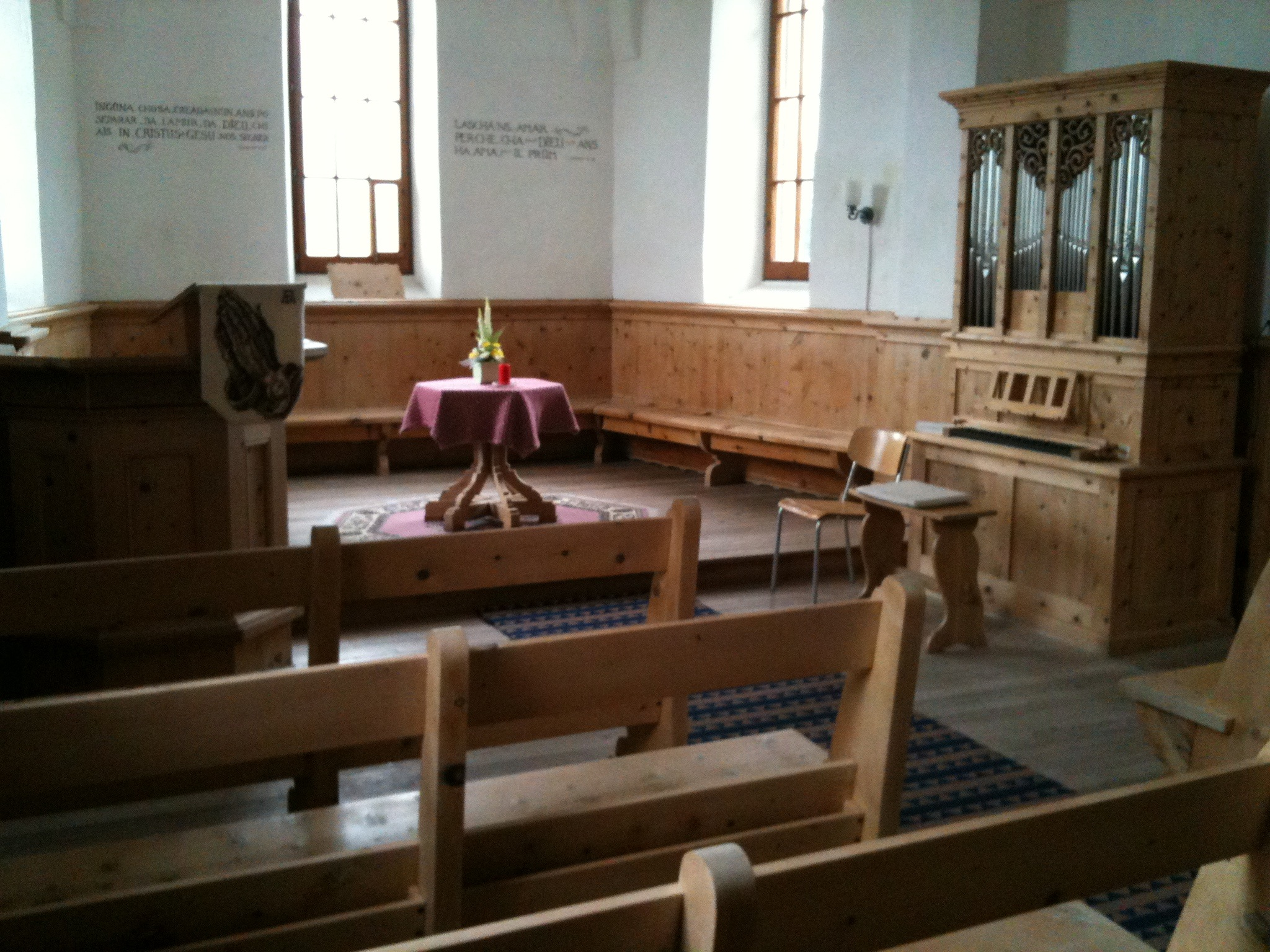 reformierte Kirche Lü, Kanton Graubünden